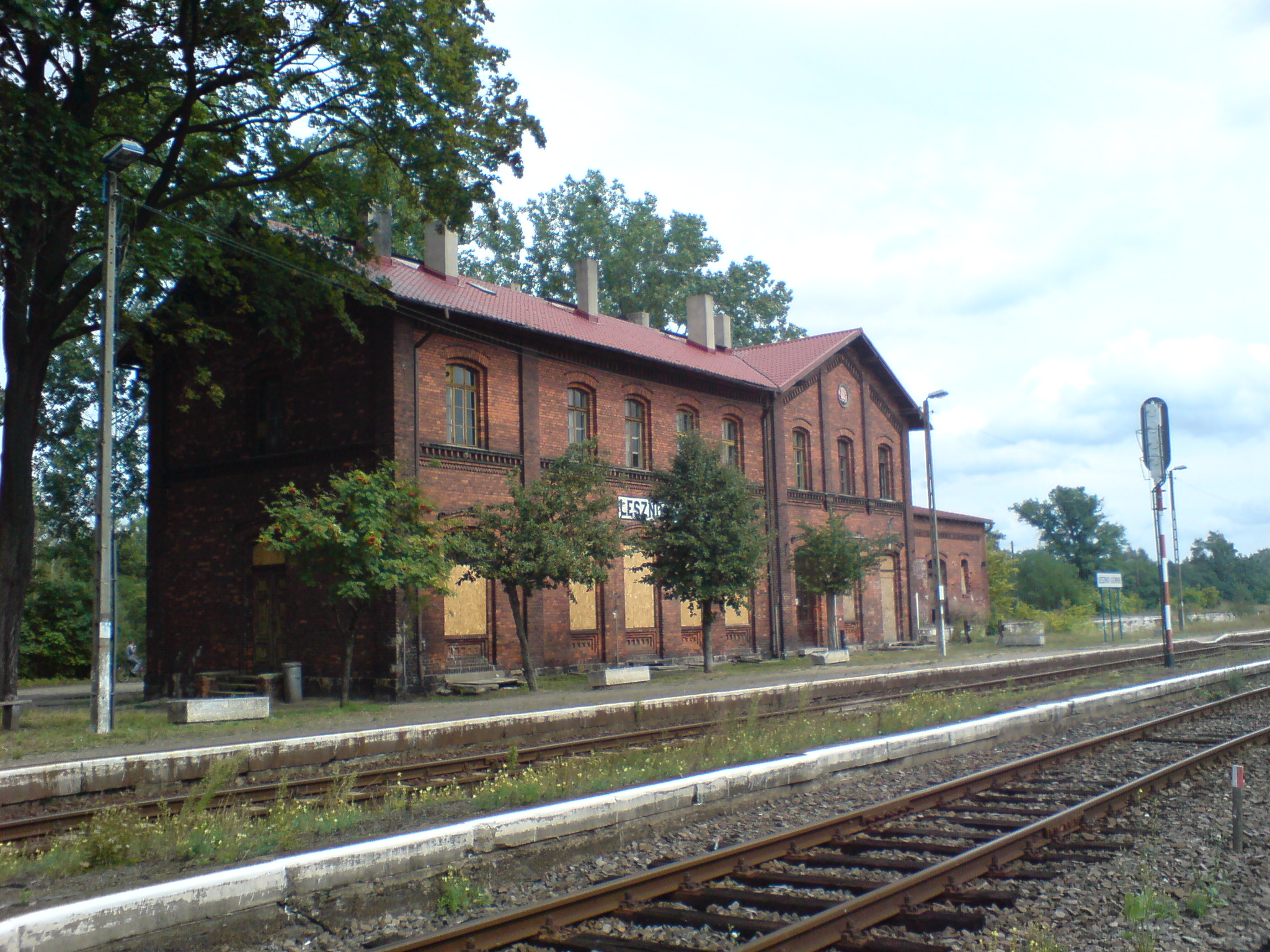 Stacja kolejowa Leszno Górne